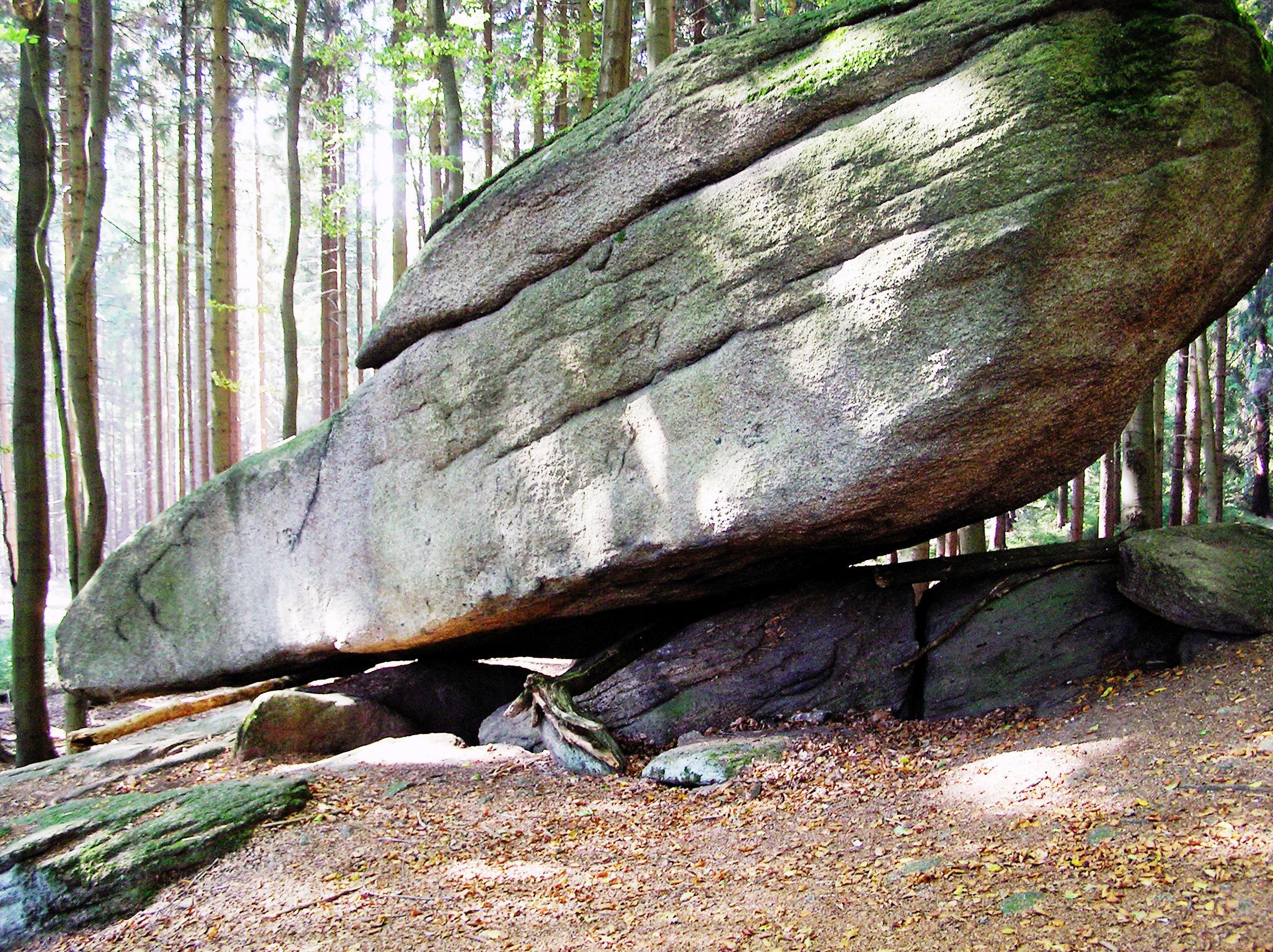 Wackelstein am Großen Kornberg